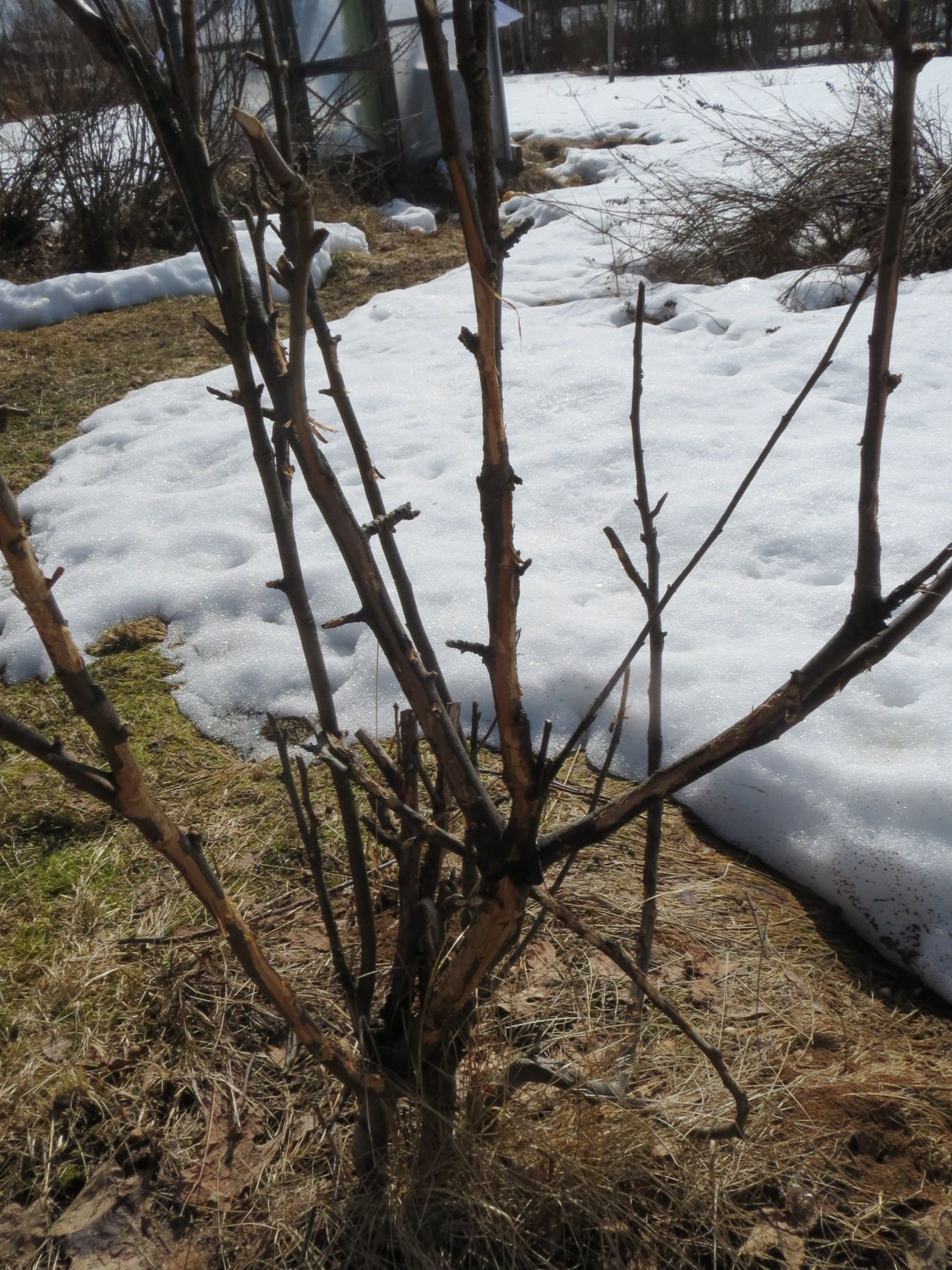 Rusakon tuhoja talven jäljiltä omenapuussa